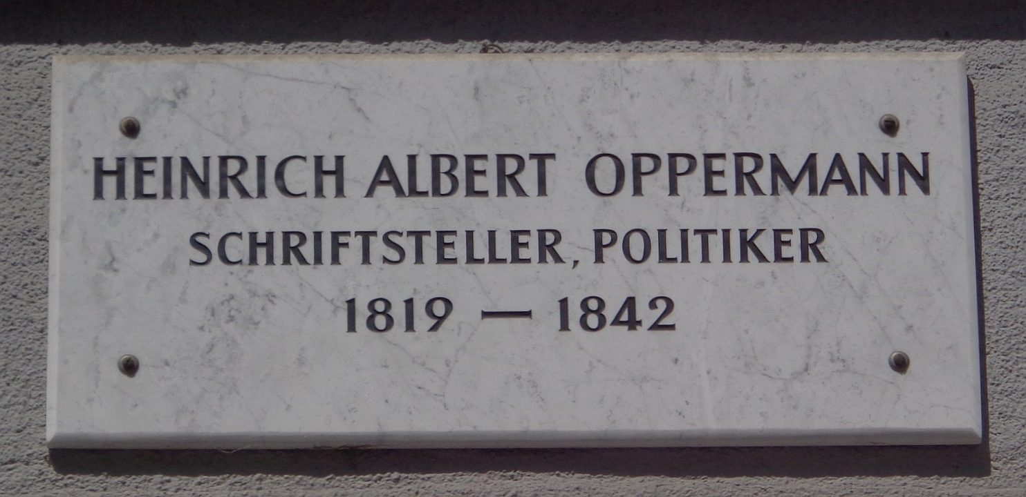 Göttinger Gedenktafel für Heinrich Albert Oppermann (Prinzenstraße 14)